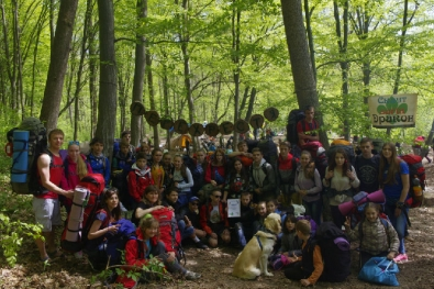 туристи